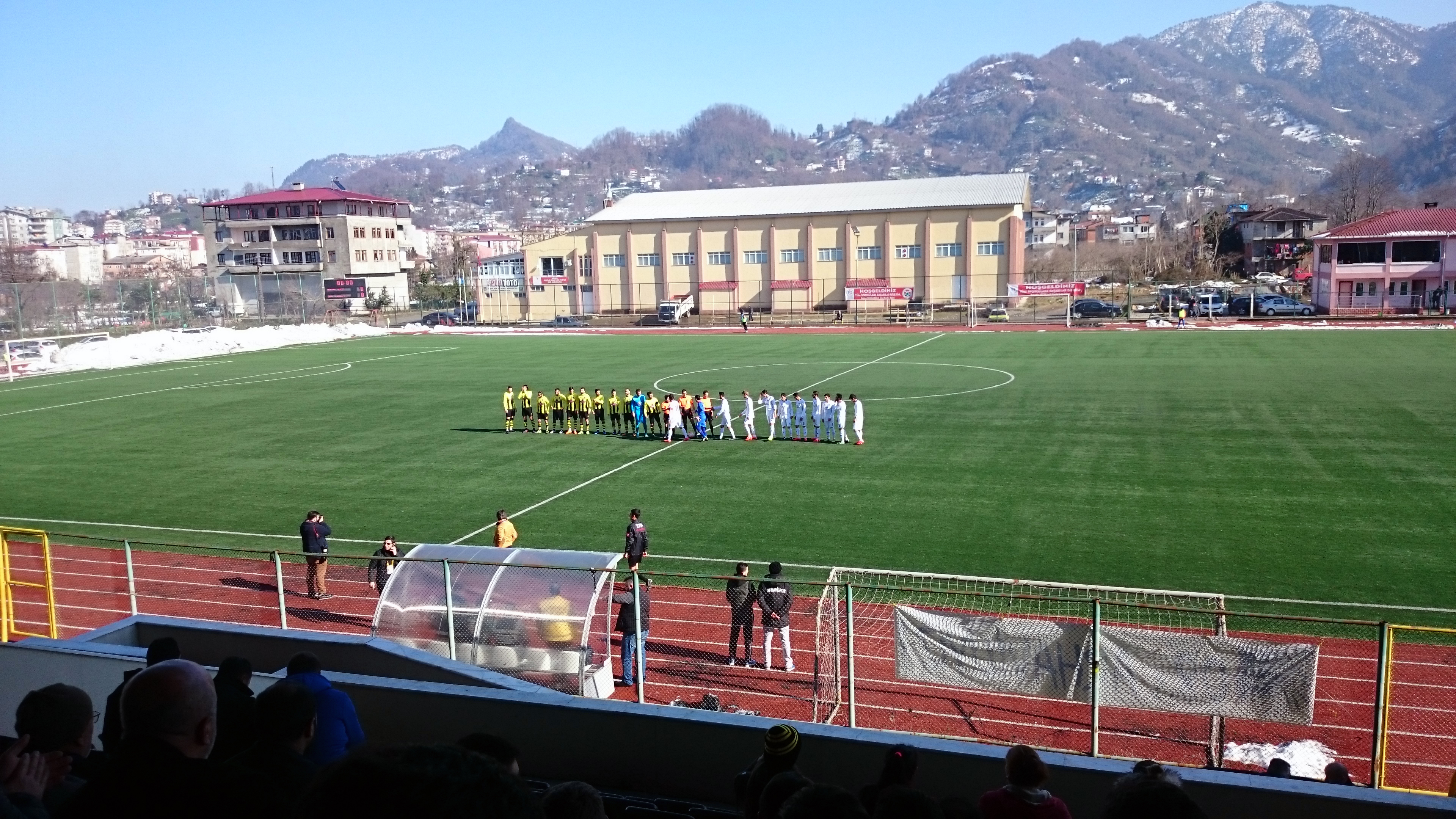 31 Ocak 2016'da Arhavi Şehir Stadında oynanan Arhavispor -Gümüşhane Telekomspor maçından bir görüntü